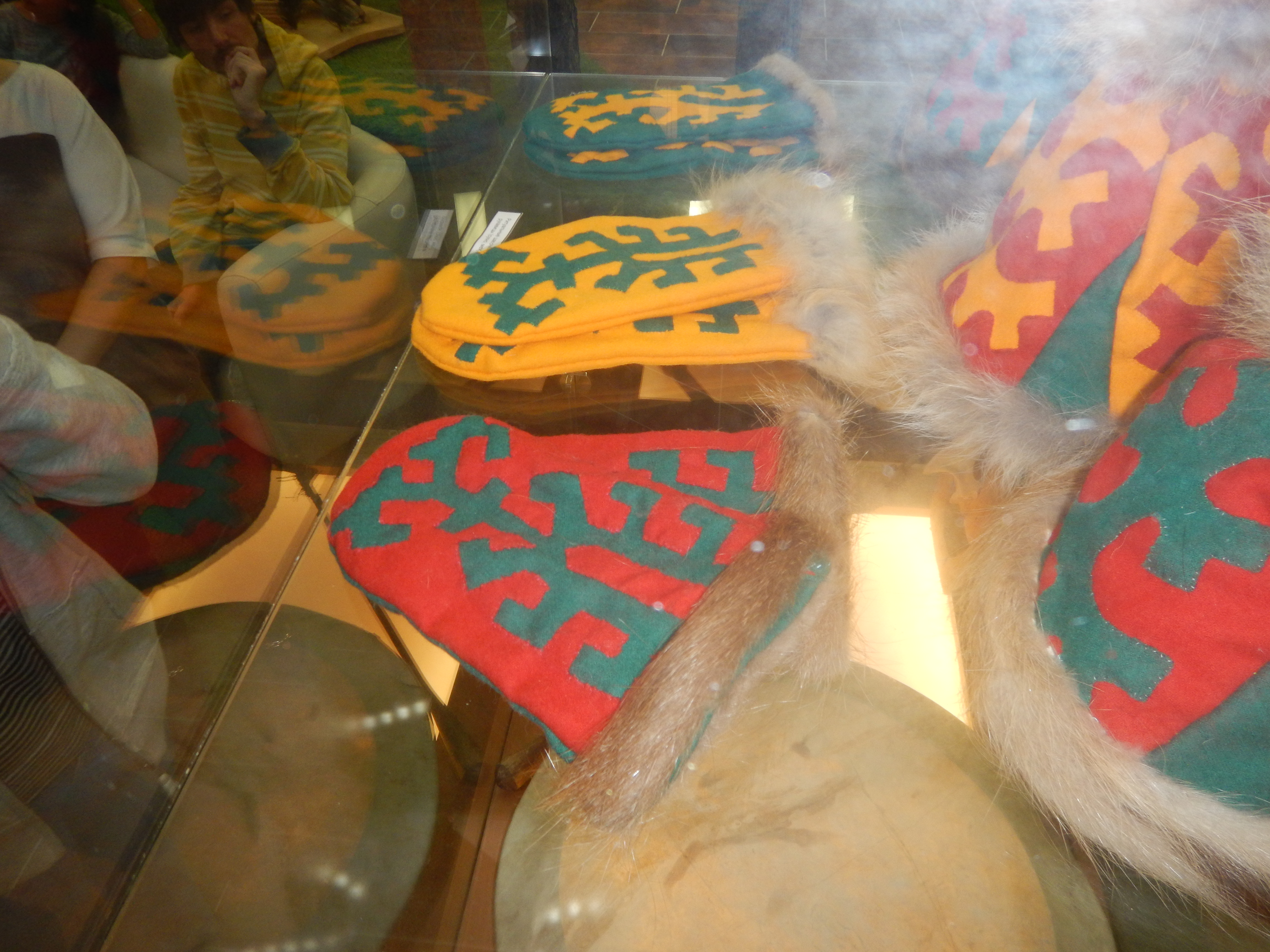 Handschuhe und Hüte, die für Zeremonien zum Bärenfest getragen werden (Heimatmuseum Belojarski)